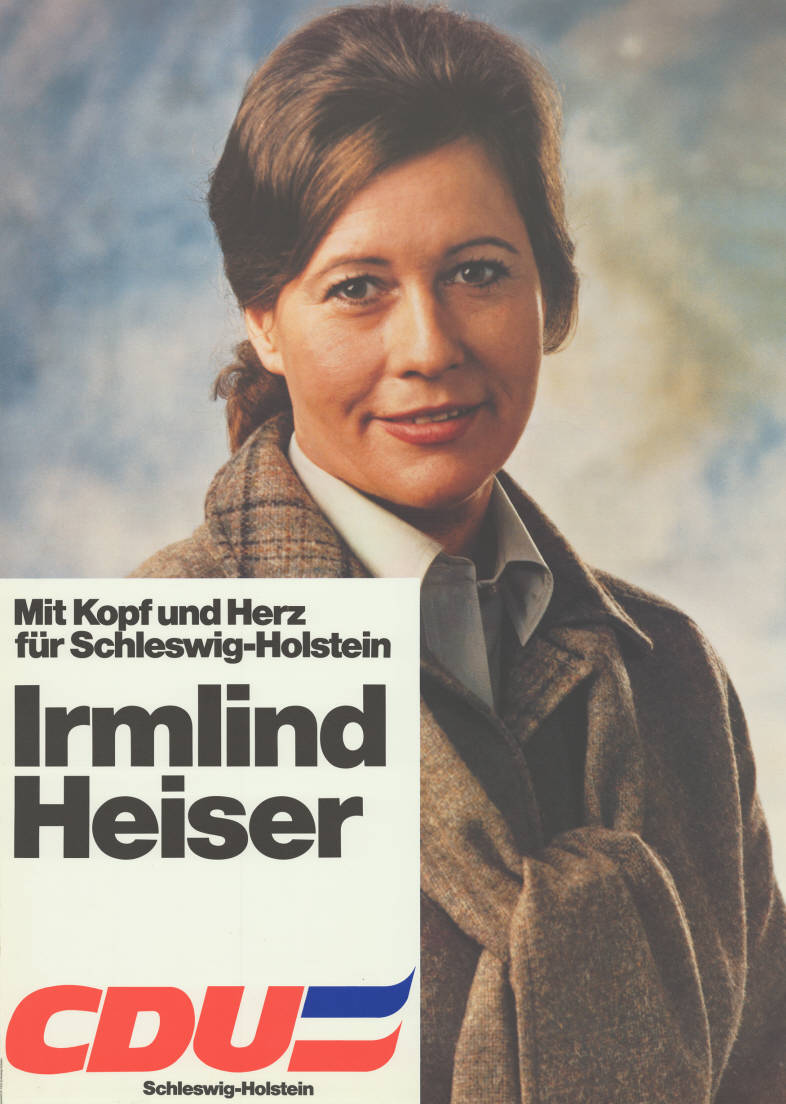 Mit Kopf und Herz für Schleswig-Holstein Irmlind Heiser CDU Schleswig-HolsteinAbbildung:FotoPlakatart:Kandidaten-/Personenplakat mit PorträtAuftraggeber:Verantw.: CDU Schleswig-Holstein Objekt-Signatur:10-012 : 438Bestand:Landtagswahlplakate Schleswig-Holstein (10-012)GliederungBestand10-18:Landtagswahlplakate Schleswig-Holstein (10-012) » Landtagswahl am 29.4.1979 » KandidatenplakateLizenz:KAS/ACDP 10-012 : 438 CC-BY-SA 3.0 DE